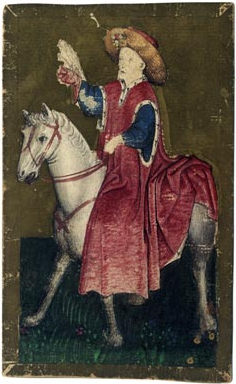 Carte Roi de Faucon du Ambraser Hofjagdspiel